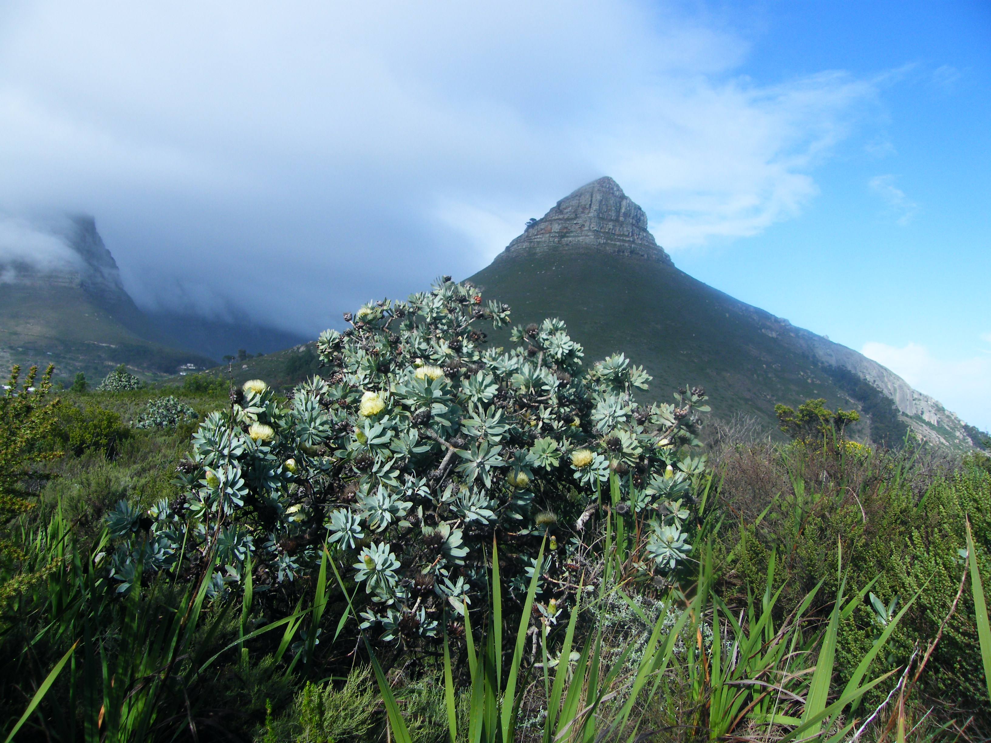 Waboom